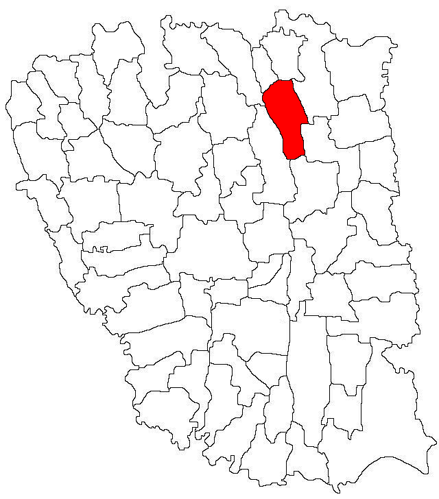 Categorie:Hărţi ale judeţului Galaţi